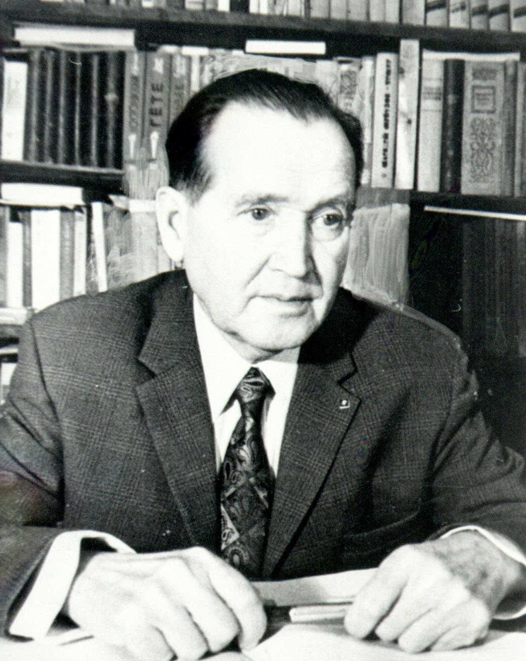 Чӑвашла: Алакӗр Ваҫлейӗ